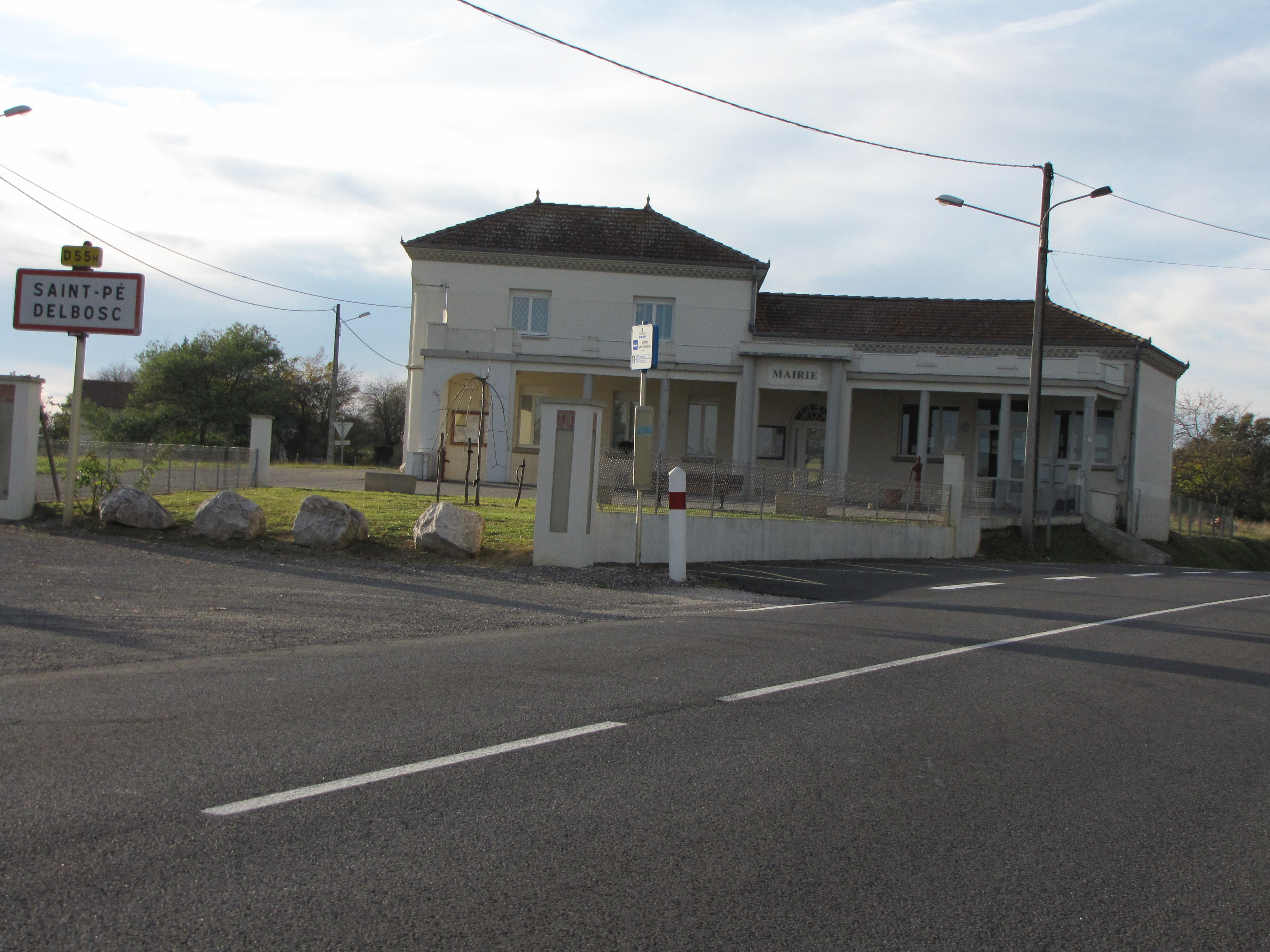 Saint-Pé-Delbosc